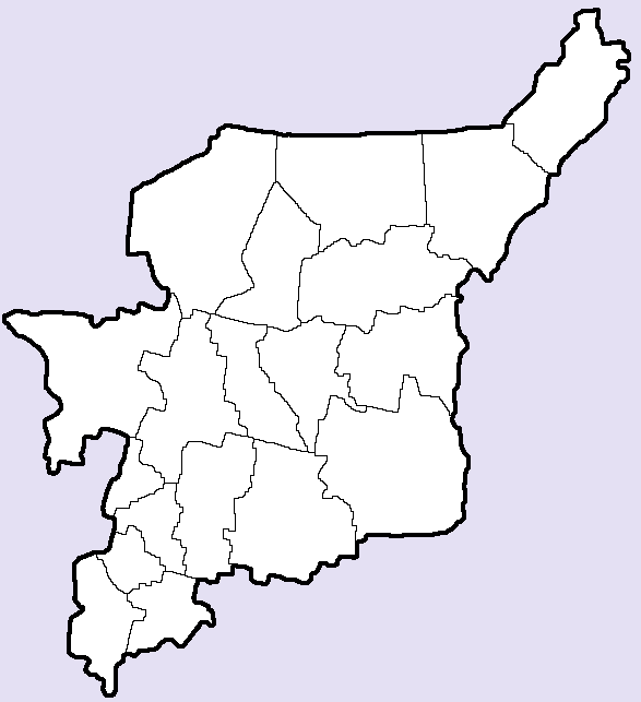 Карта Республики Коми